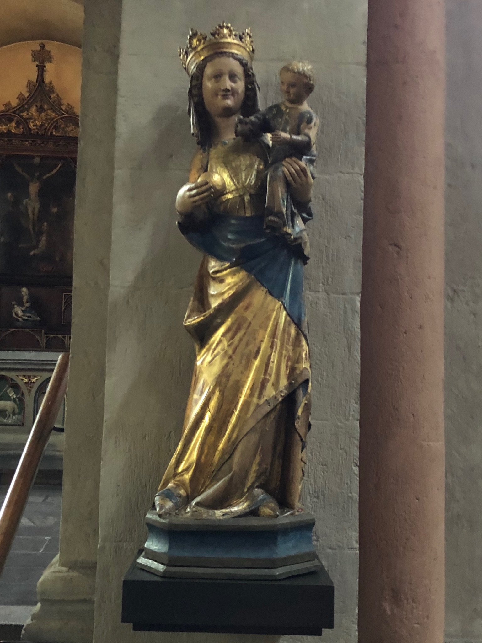 Spätmittelalterliche Madonna aus St. Maria Lyskirchen in Köln